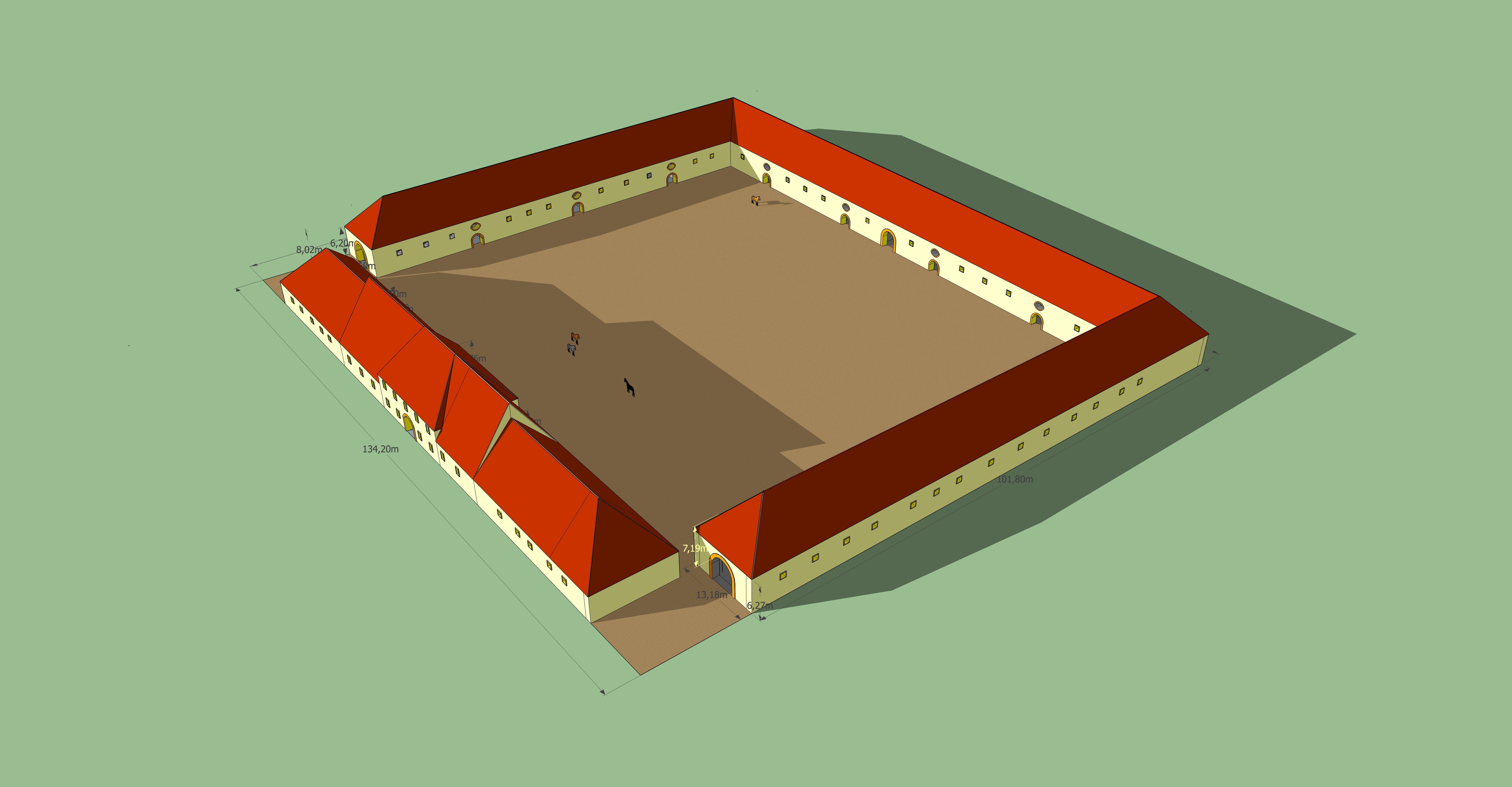 Hofgestüt Bleesern - Ursprungszustand um 1686